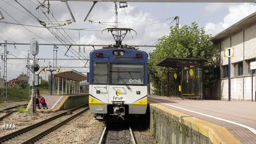 FEVE El Berron andenes